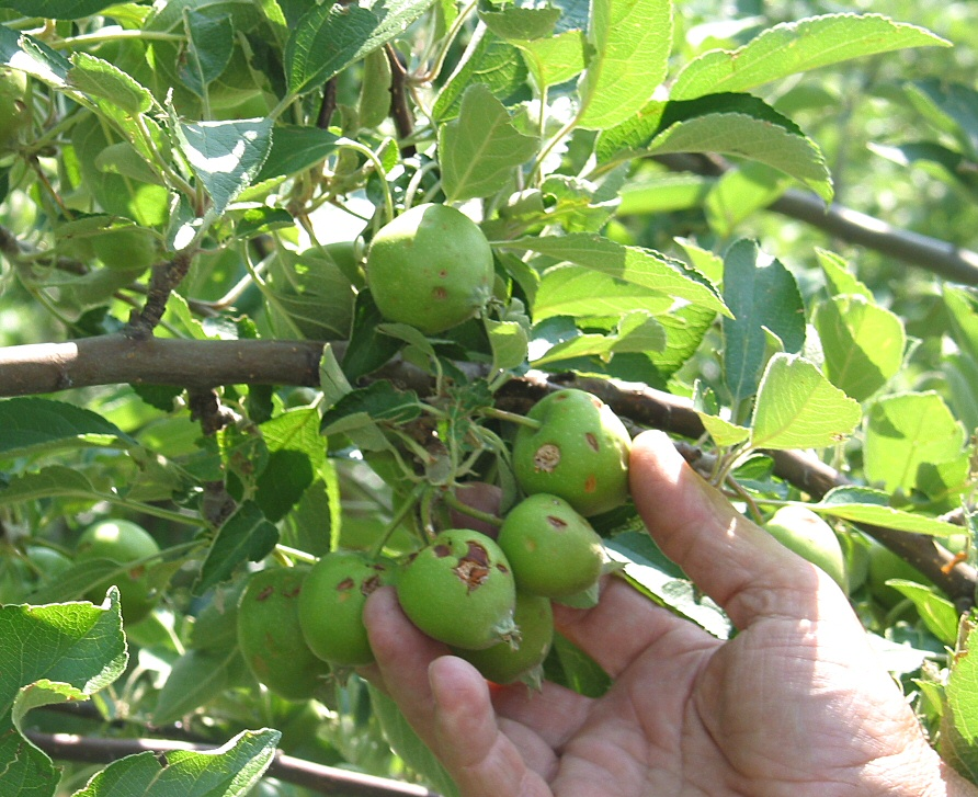 Dégâts de grêle sur pommiers en Alsace en 2003